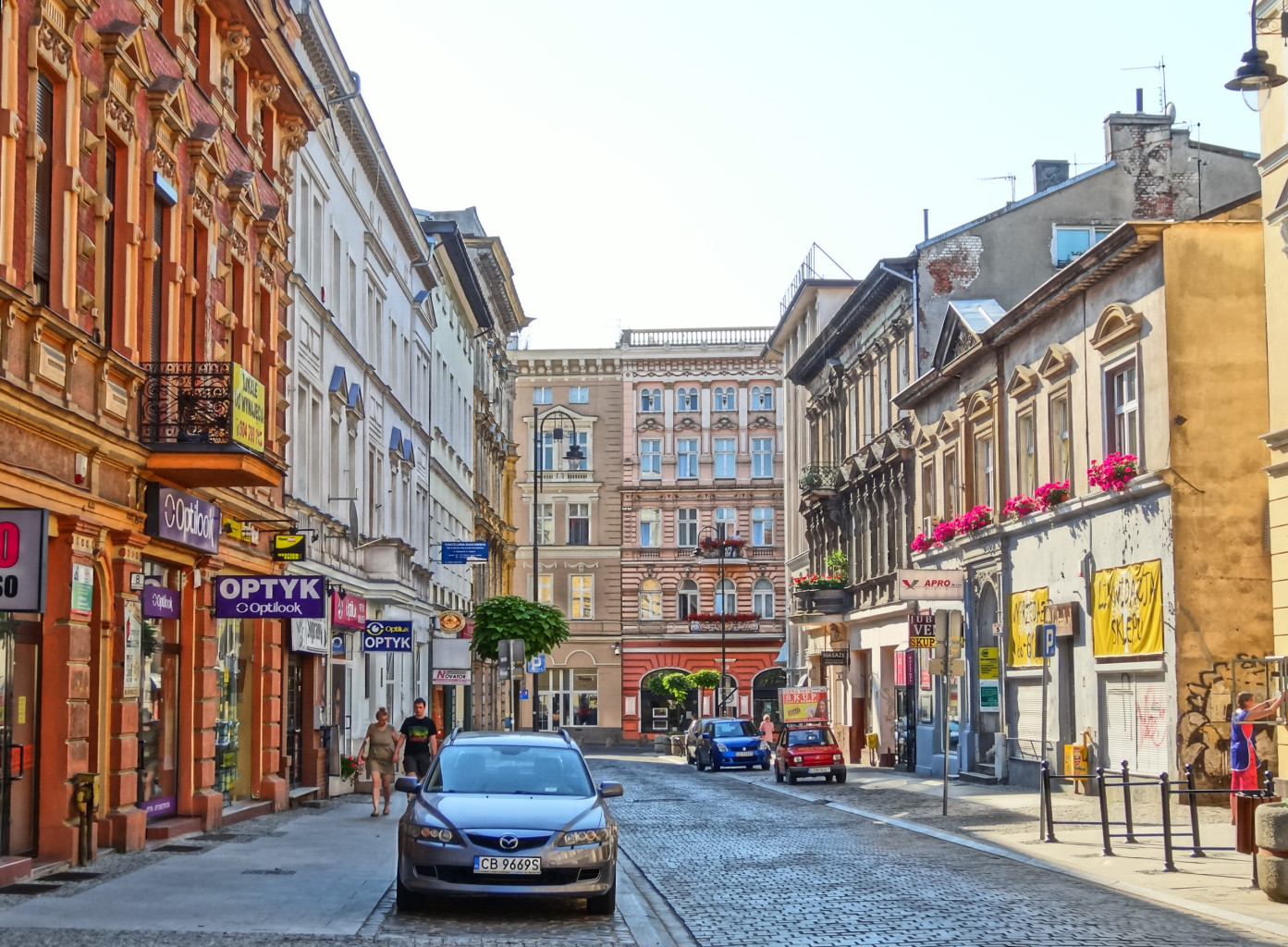 Ulica Dworcowa w Bydgoszczy na odcinku od ul. Gdańskiej do ul. Warmińskiego